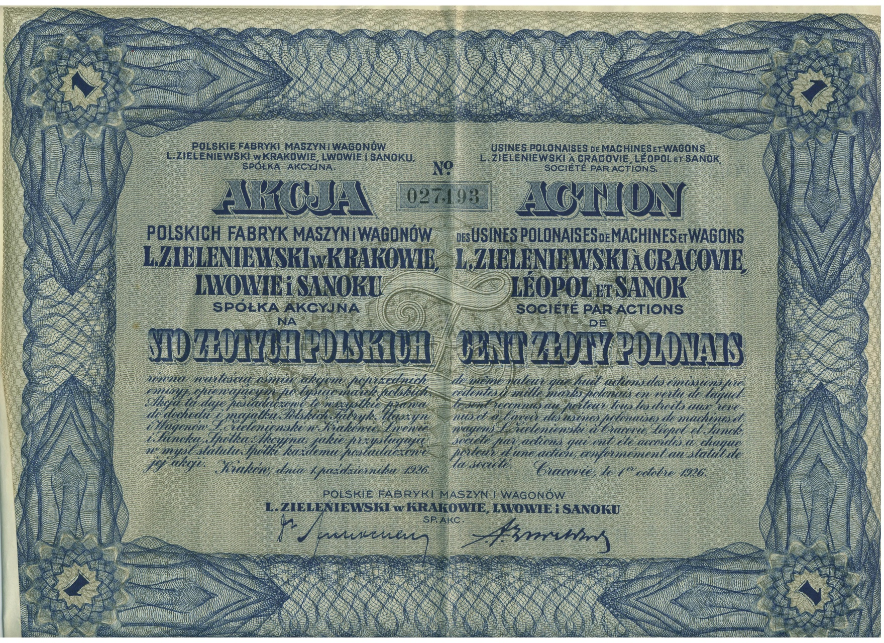 Zieleniewski Machinery Company Stock Certificate, 1925